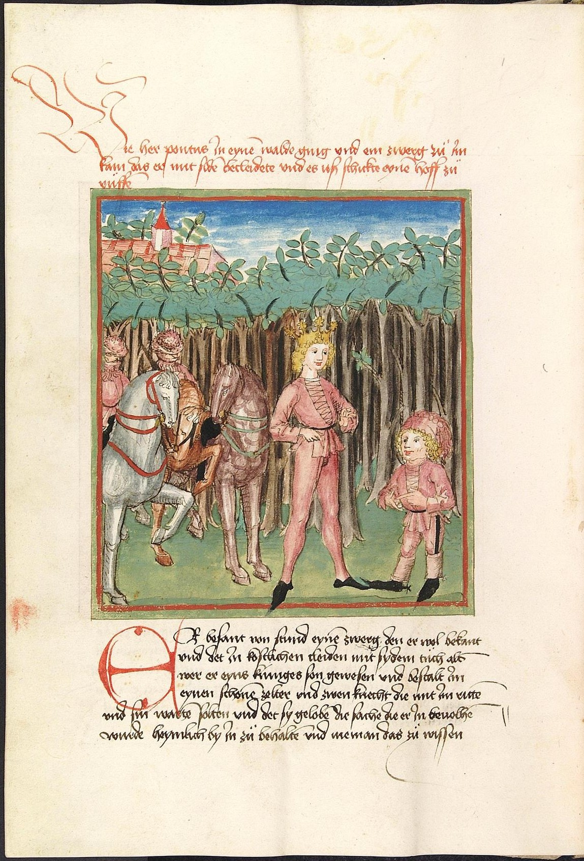 Codex Palatinus germanicus 142, Blatt 40v - Pontus und Sidonia - Pontus beauftragt den Zwerg, mit der Einladung zu einem Turnier loszuziehen